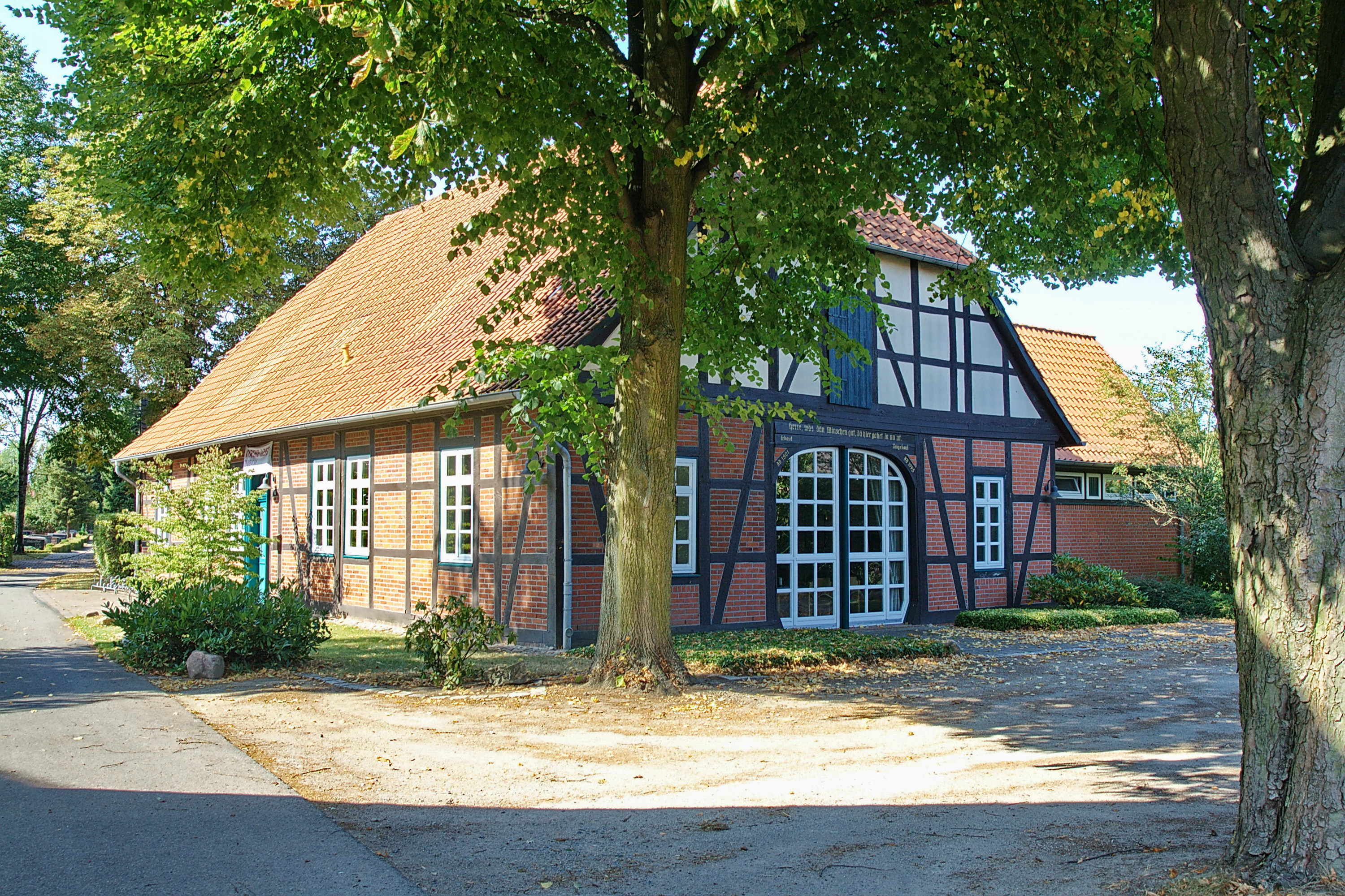 Fachwerk in Bröckel, Niedersachsen, Deutschland.